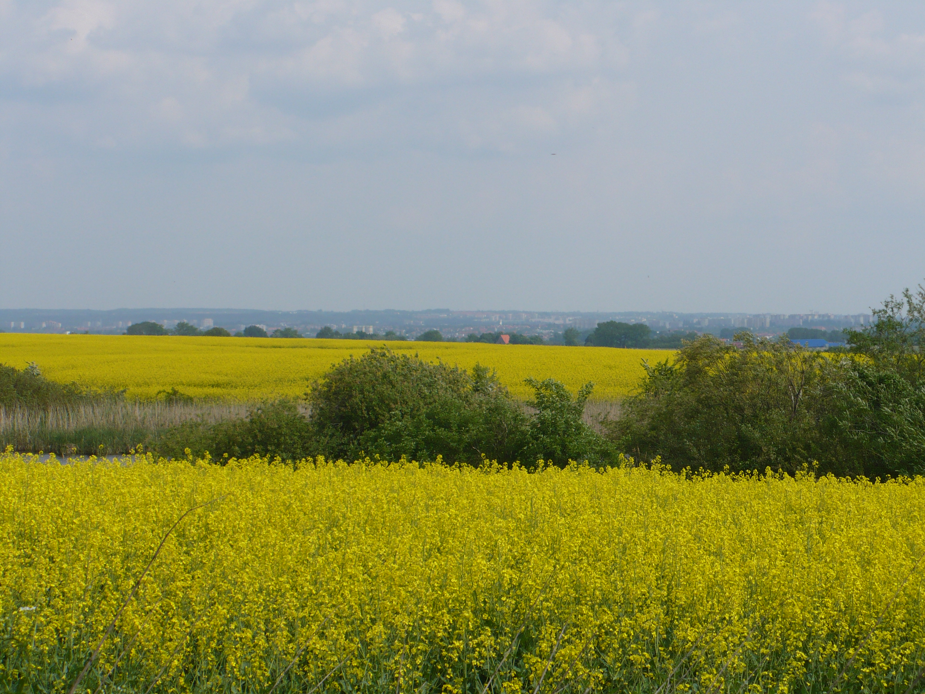 Wzniesienia Szczecińskie (Stettiner Berge) [Szczecin, Poland]